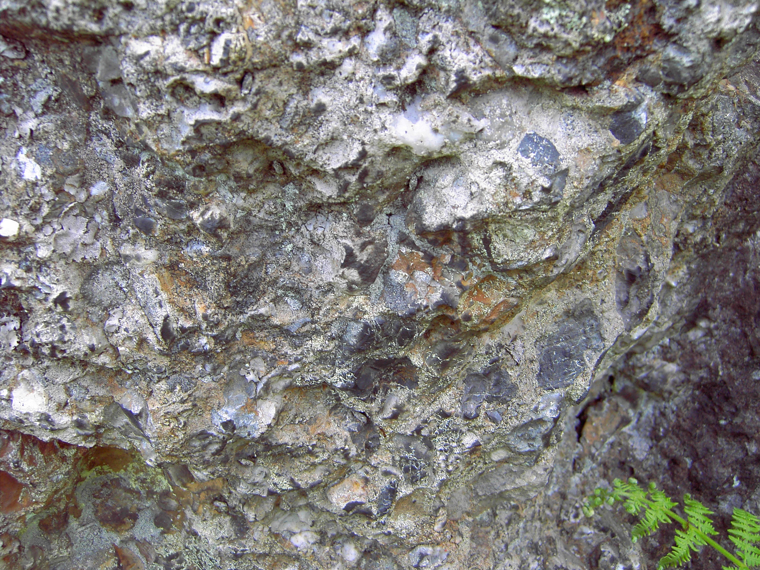 Großaufnahme des Gedauer Konglomerats